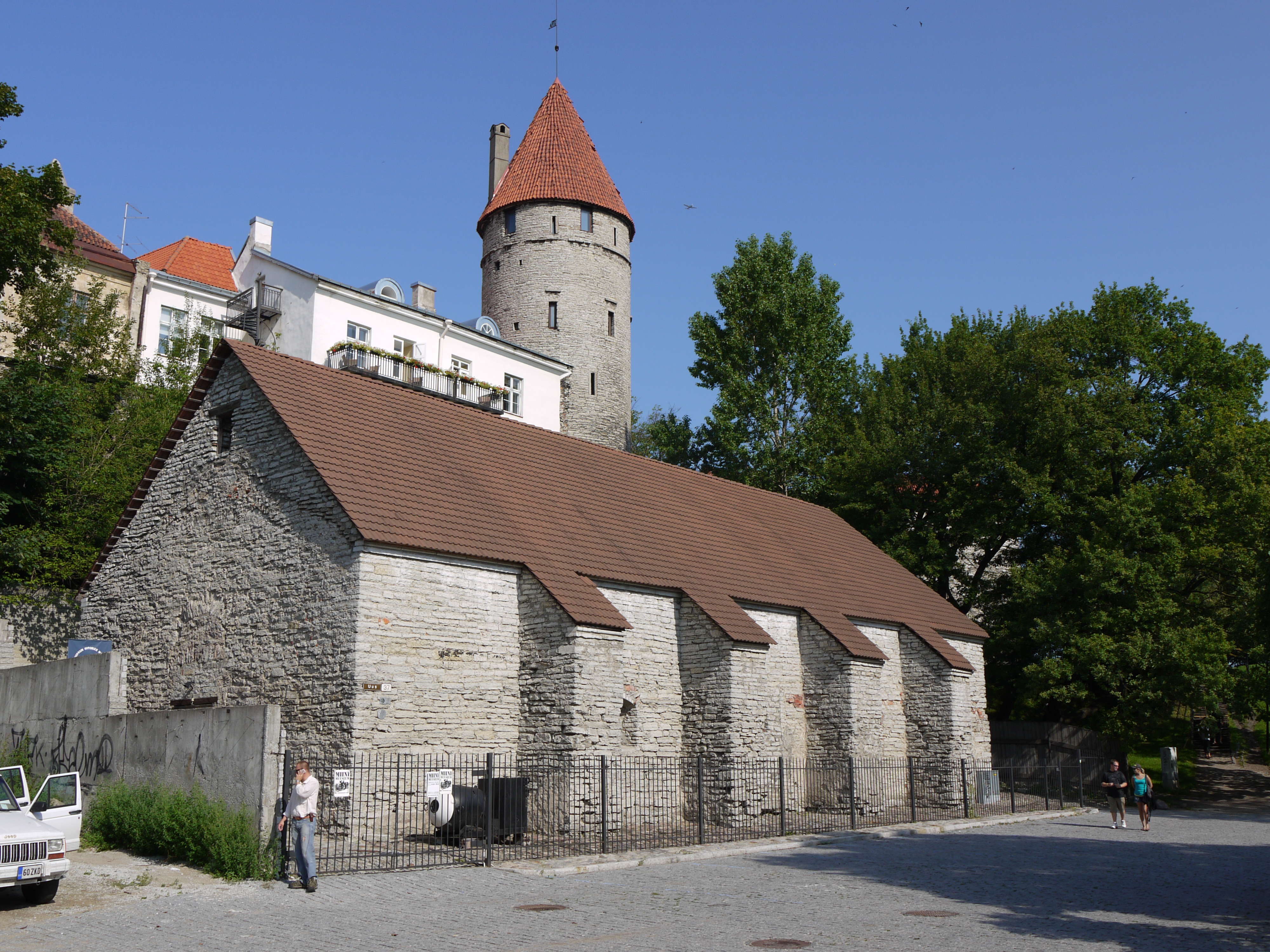 Tallinna püssirohuait